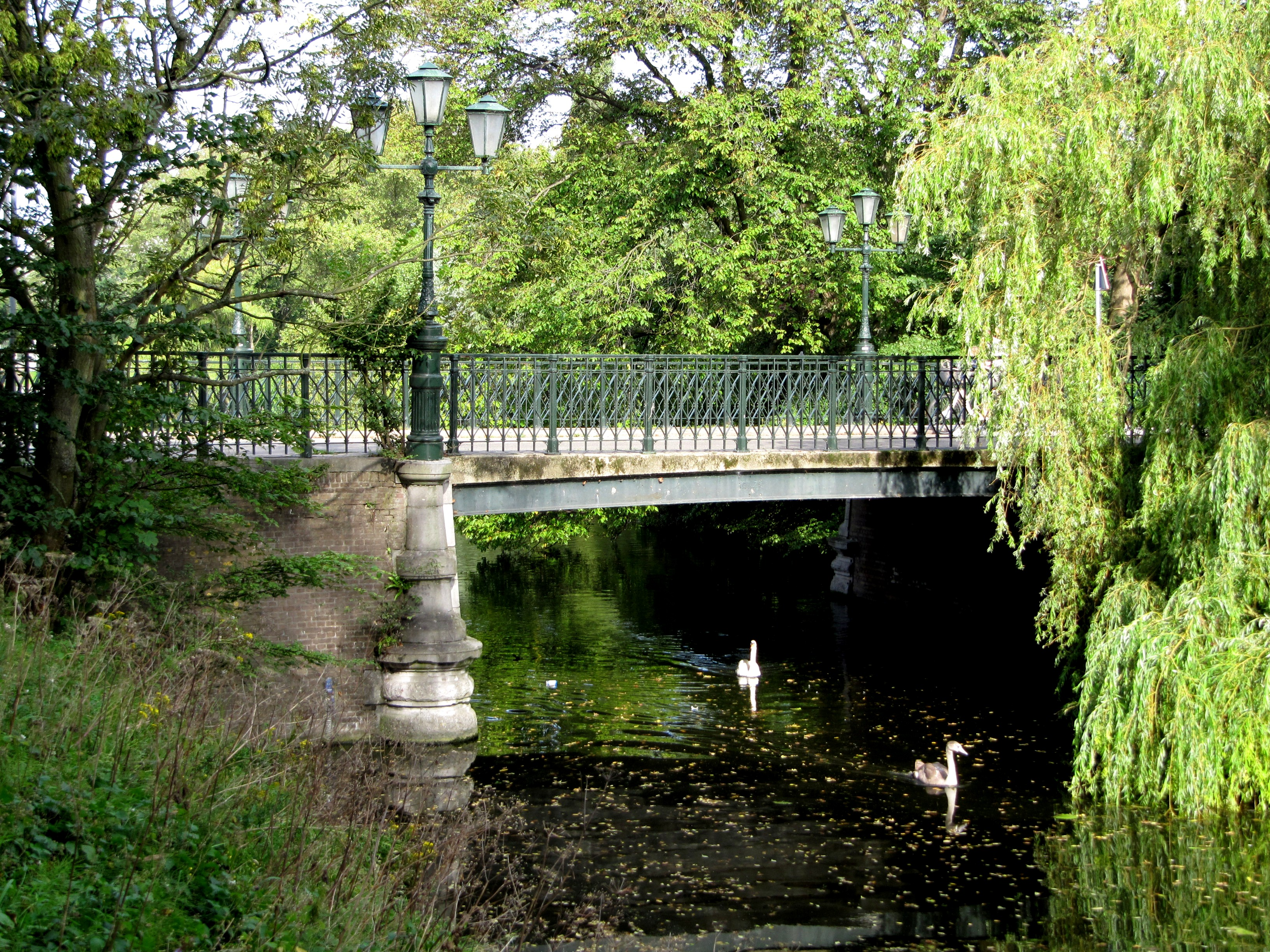 RM477414 Den Haag - Nieuwe Duinwegbrug (1).jpg